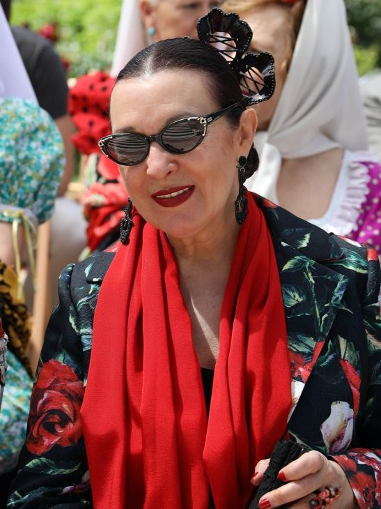 San Isidro llena Madrid de música con cerca de doscientas actividades y conciertos